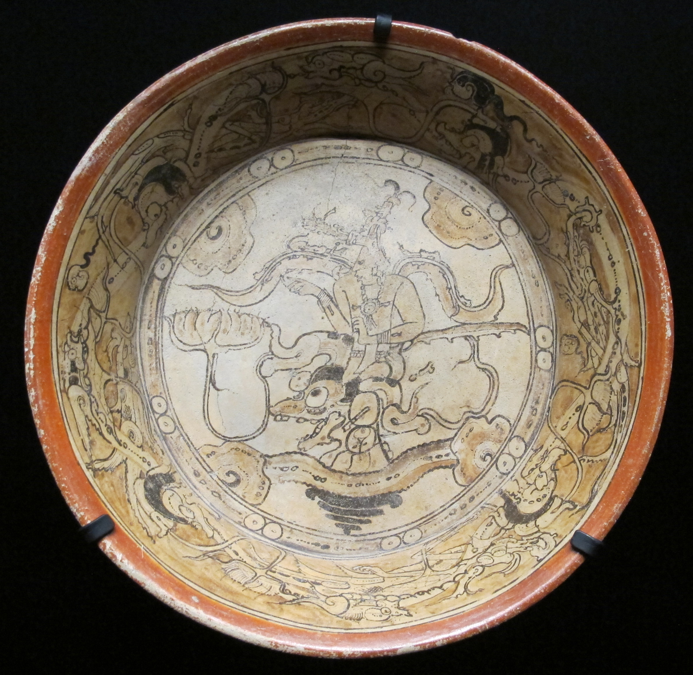 Musée du quai Branly